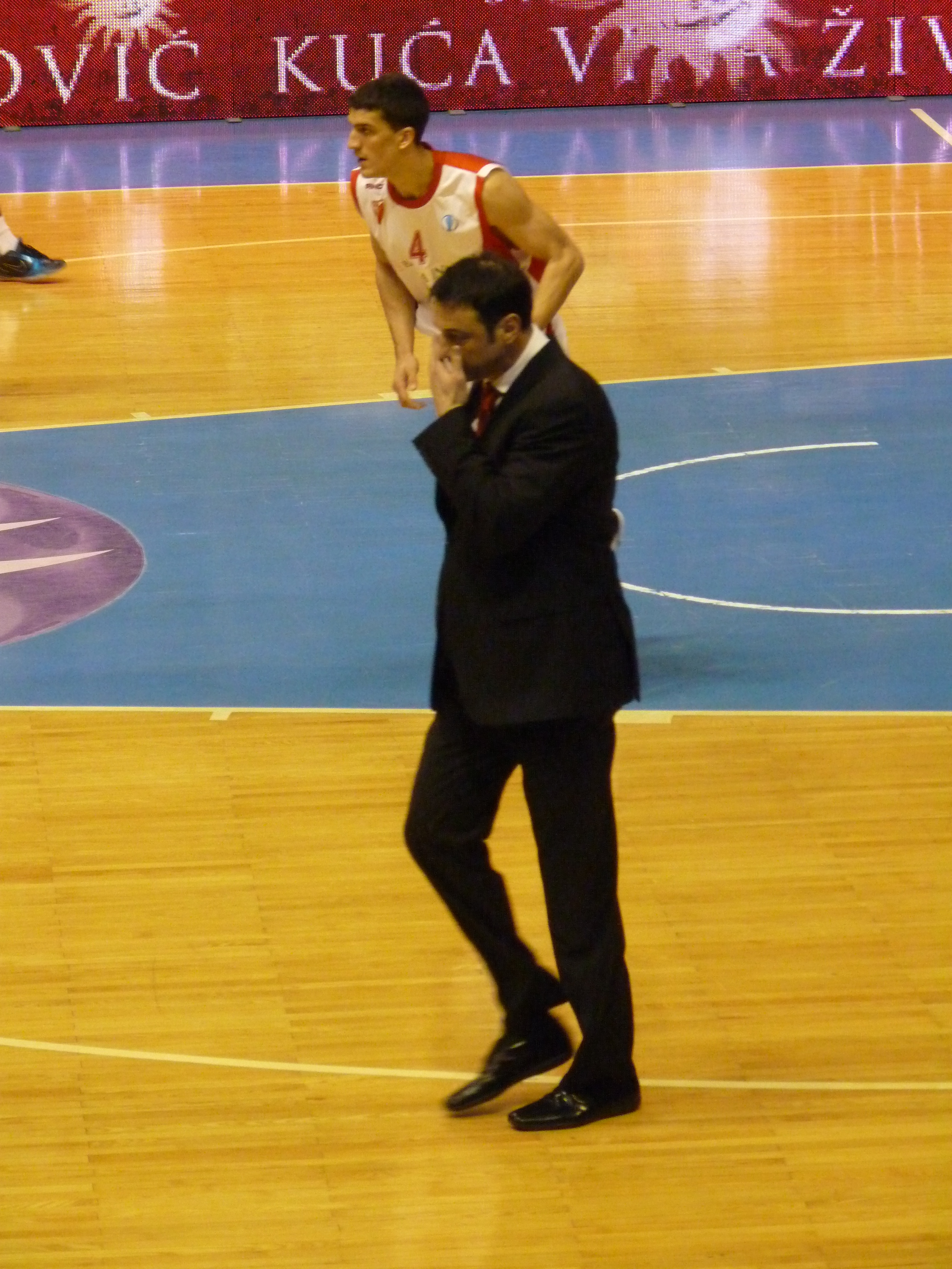 Aleksandar Trifunović i Marko Kešelj